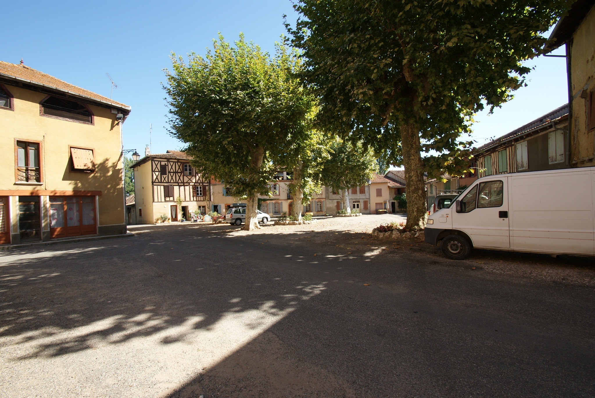 Een sfeervol pleintje in Simorre.